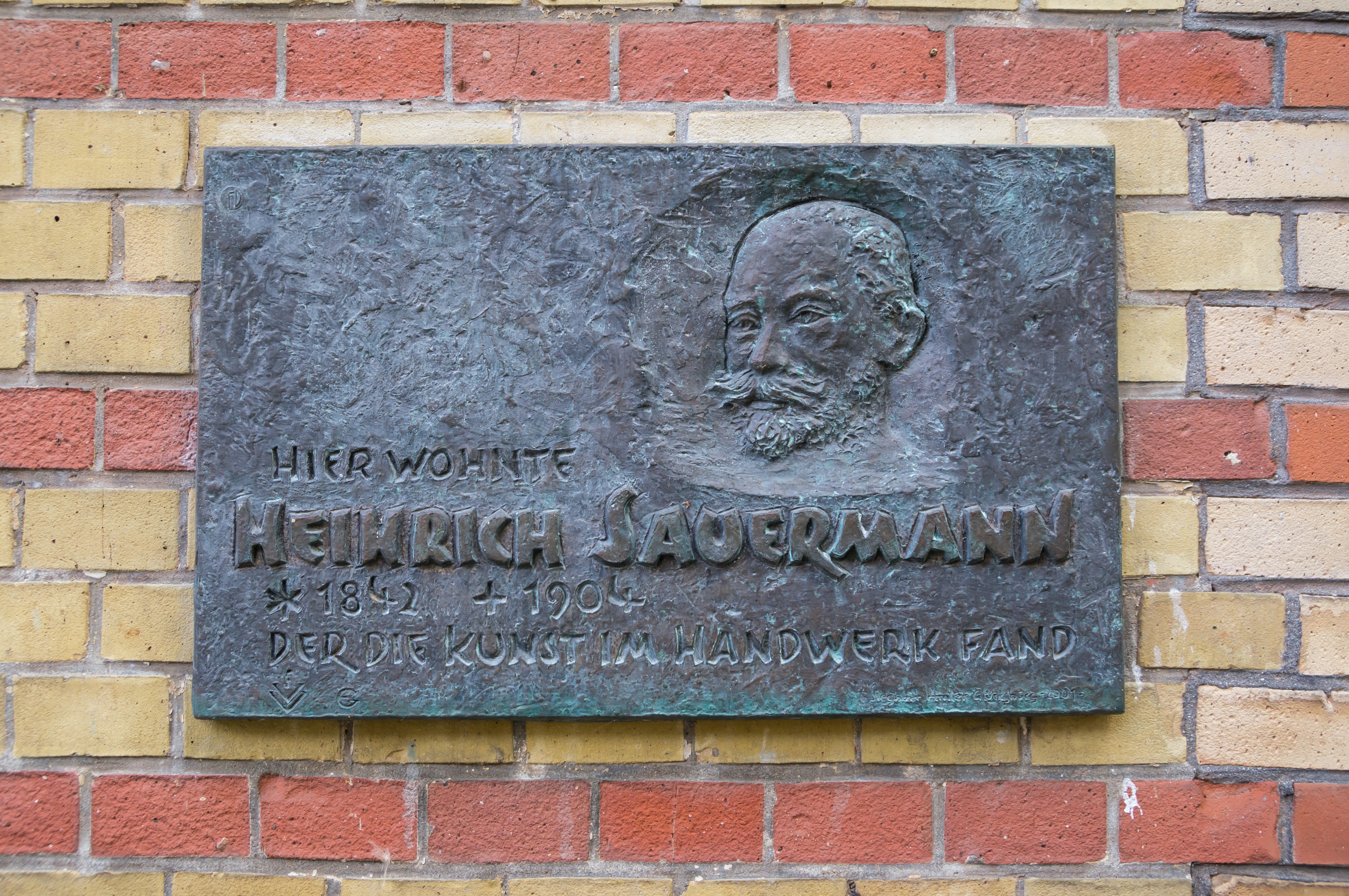 Flensburg-Altstadt, Suedergraben 47, Gedenktafel für den Möbeltischler und Bildschnitzer und Direktor des Flensburger Kunstgewerbemuseum Heinrich Sauermann. Die Tafel wurde für den Flensburger Verschönerungsverein FVV von dem Künstler Siegbert Amler (Glücksburg) 2001 angefertig. Sie ist auf der rechten Seite des Wohnhauses von Heinrich Sauermann angebracht.